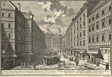 Gundelhof, Brandstätte 5/Bauernmarkt 4, 1010 Wien